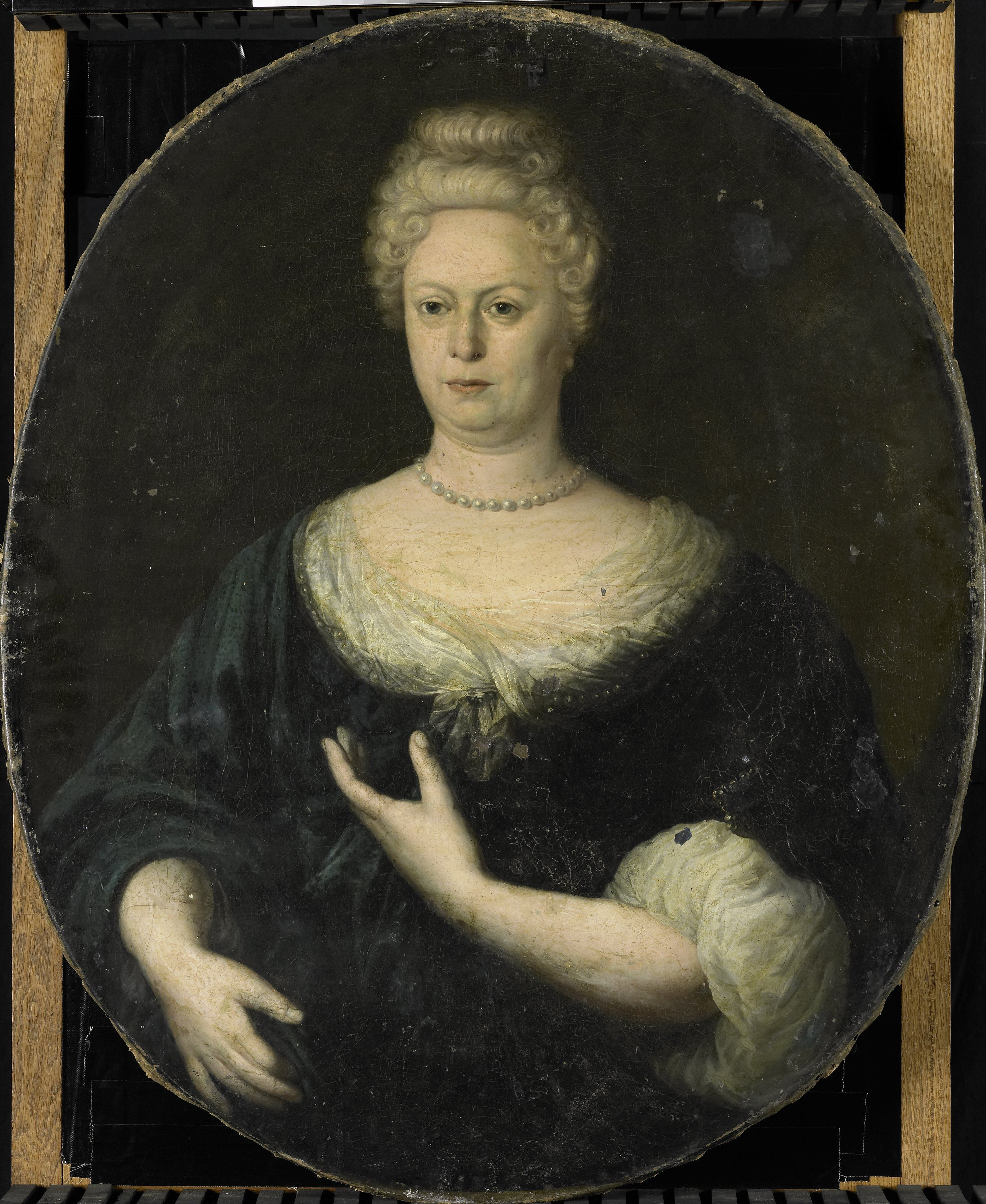 Portret van Elisabeth van Oosten (1660-1714). Echtgenote van Abraham van Riebeeck. Ten halven lijve in ovaal, staand. Pendant van SK-A-811.